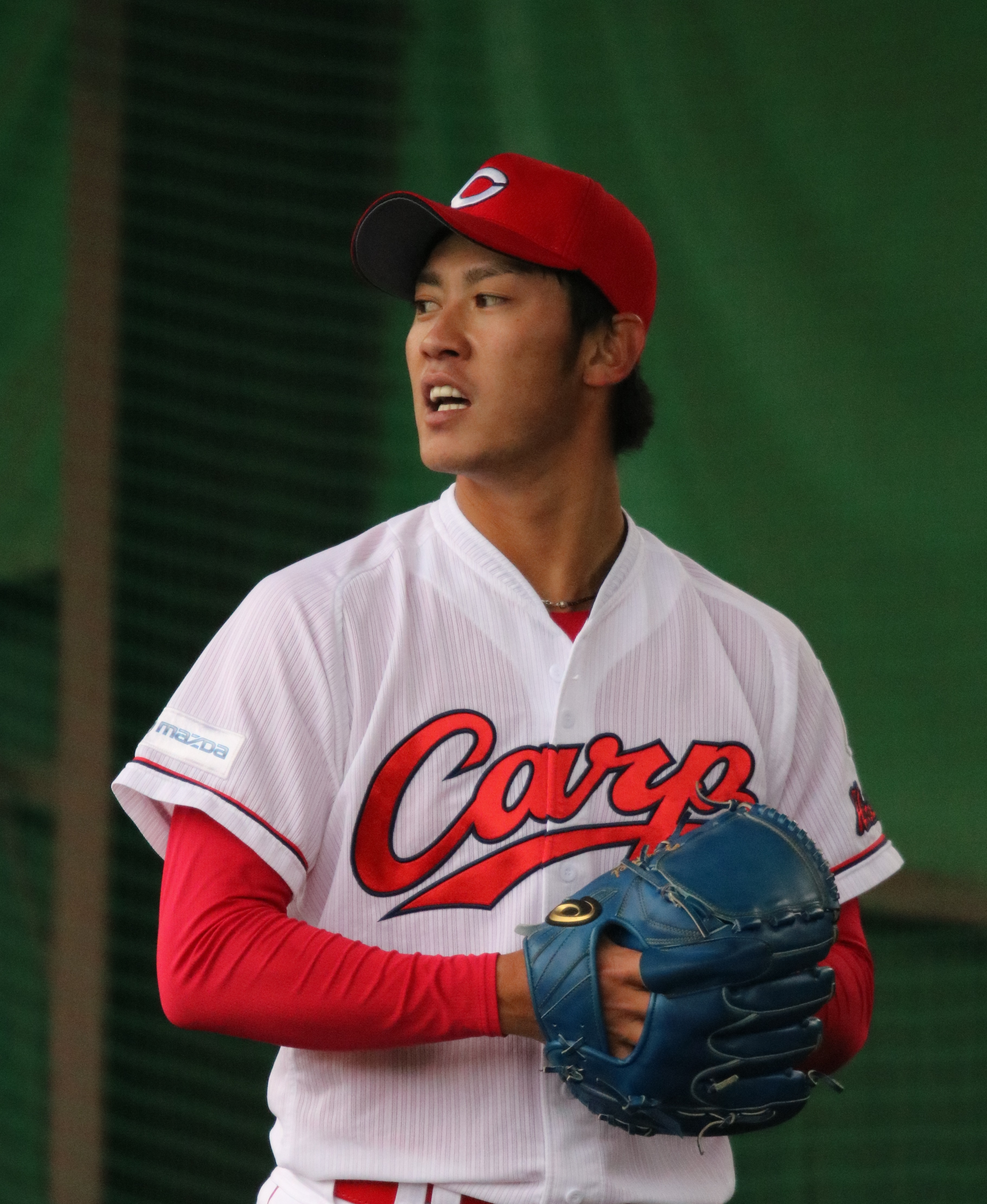 2017/11/20由宇練習場